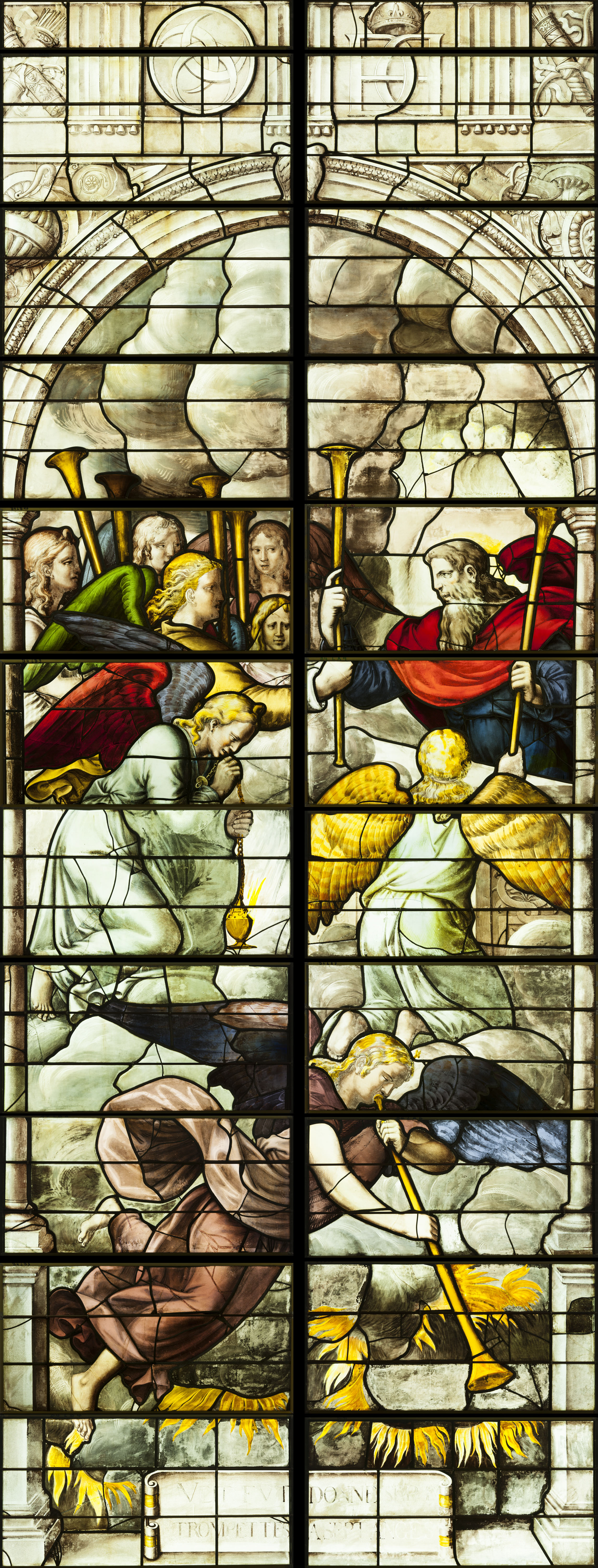 Vitrail